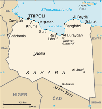 Mapa Libye - přeložená mapa z CIA World Factbook.